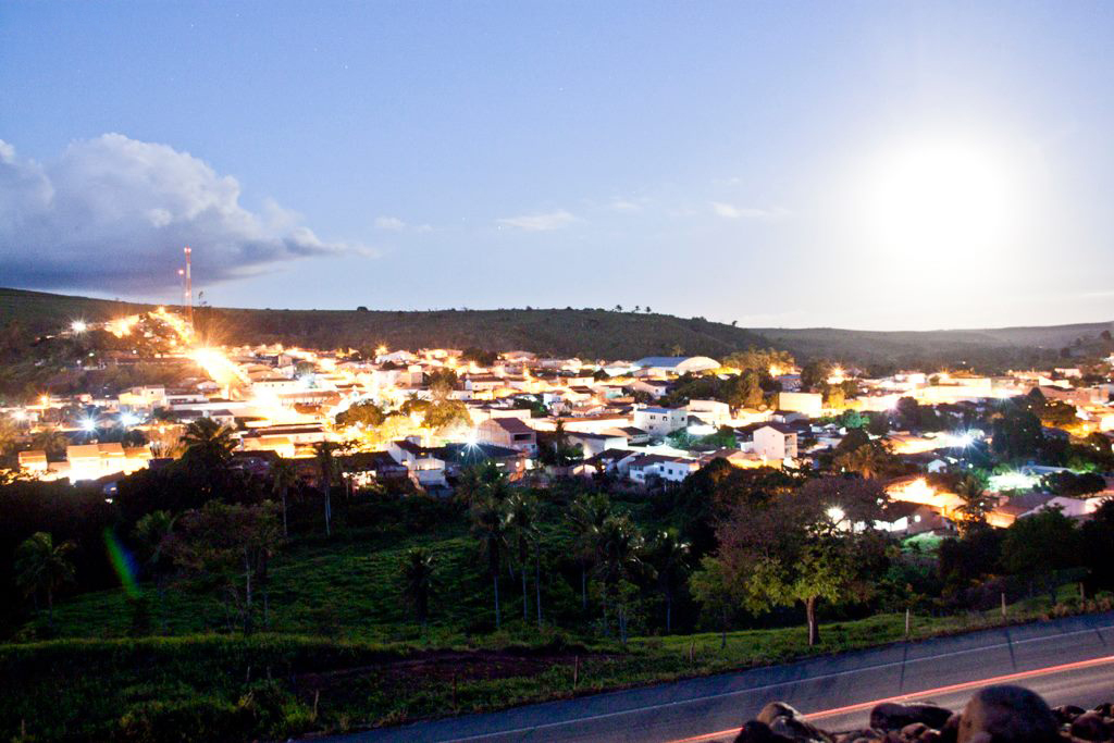 Vista parcial da cidade de Itagimirim - BA